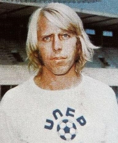 Claude Le Roy (1975, Olympique Avignon), 'Ageducatifs 1975 - 1976', Panini figurina.